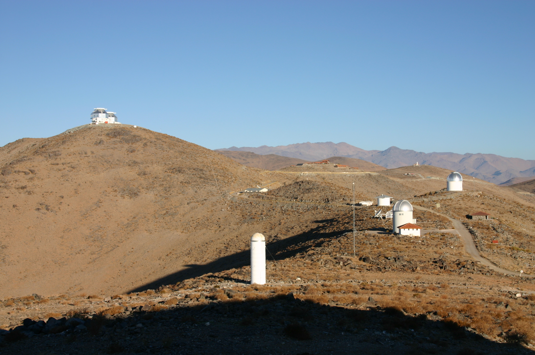 Image de l'Observatoire de Las Campanas.